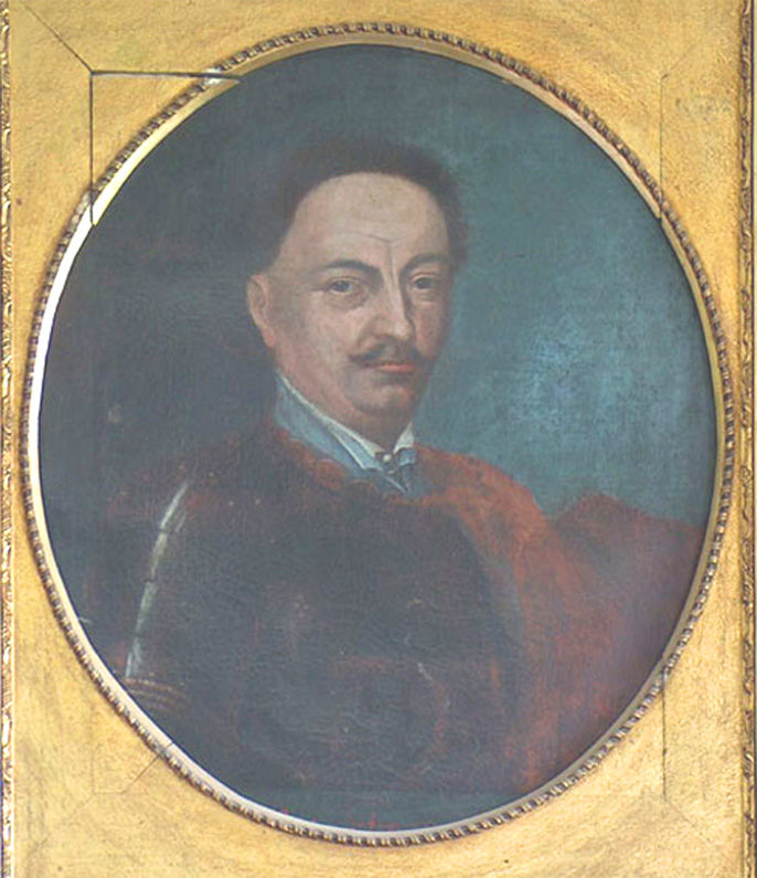 Stanisław Herakliusz Lubomirski